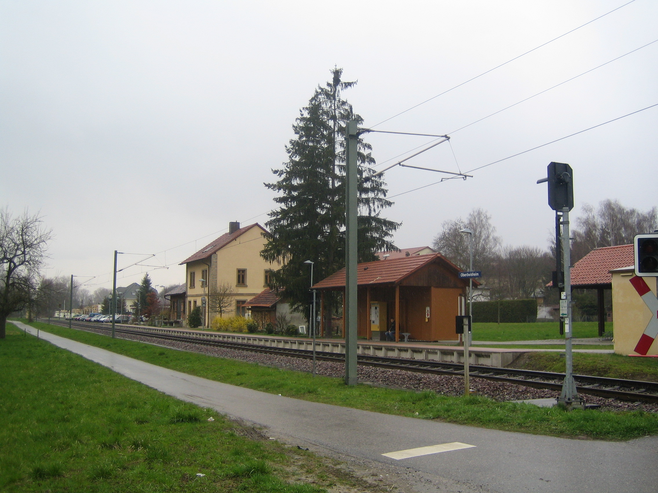 Haltepunkt Öberöwisheim